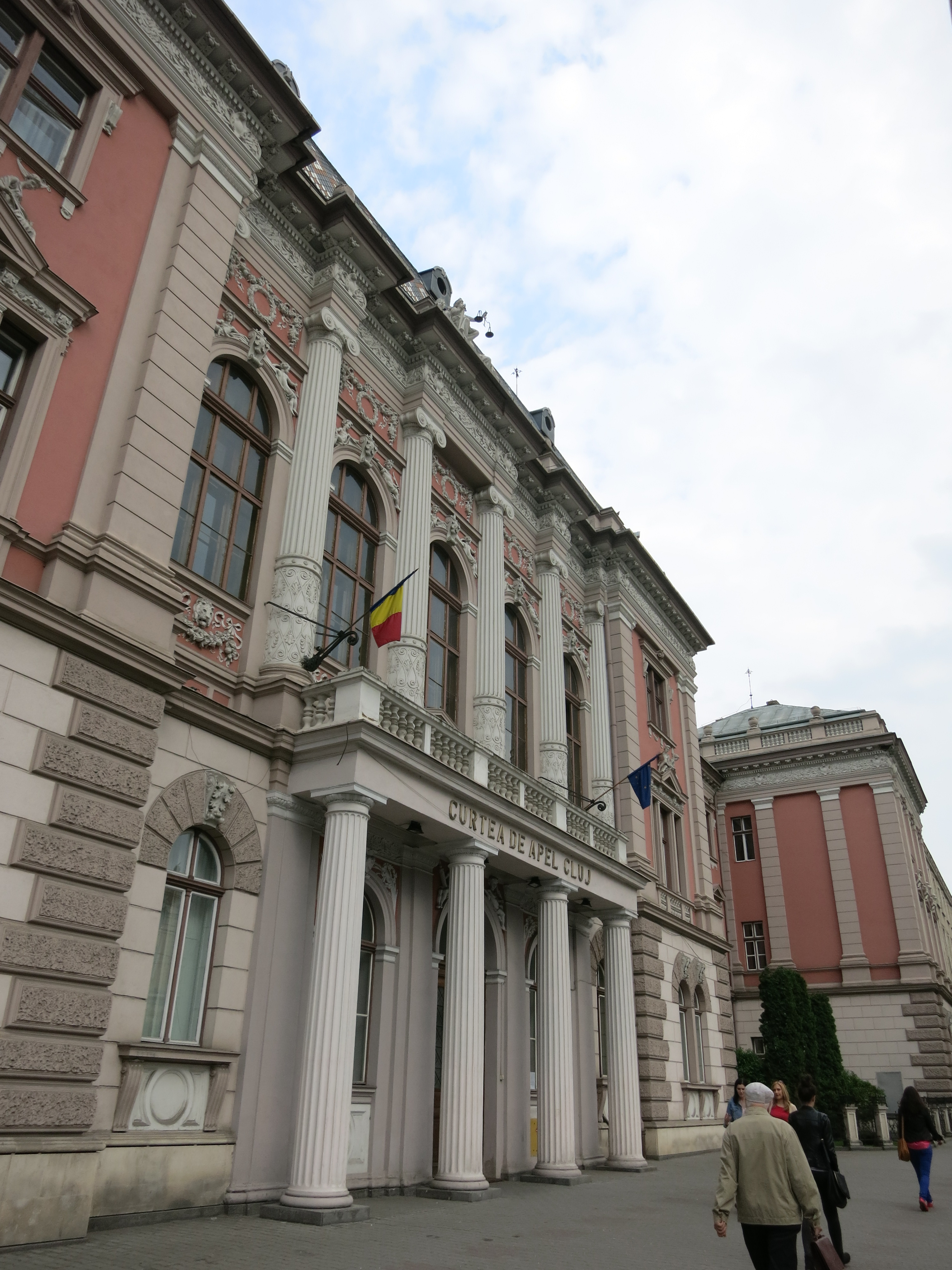 Tribunalul și Curtea de Apel, municipiul Cluj-Napoca, judeţul Cluj